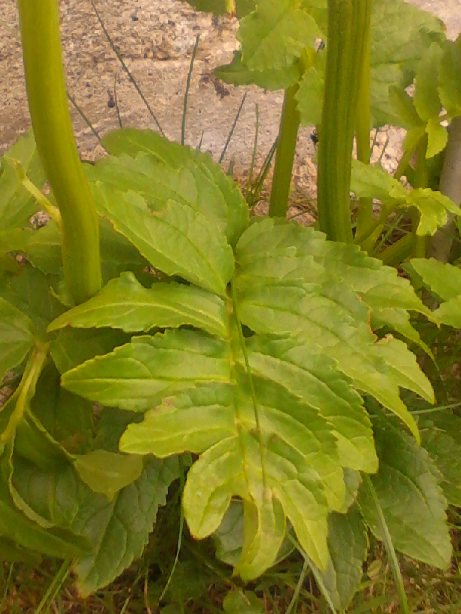 Incarvillea delavayi 'Snowtop' : feuille